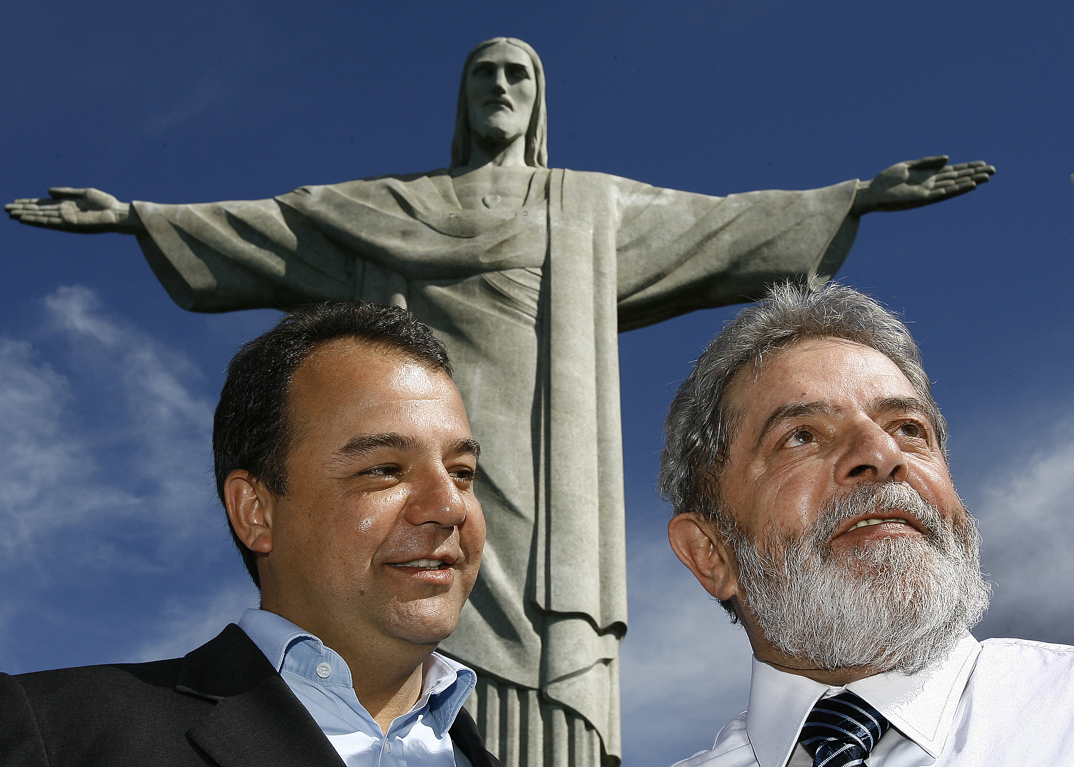 O presidente do Brasil, Luís Inácio Lula da Silva, e o governador do Rio de Janeiro, Sérgio Cabral Filho, à frente do Cristo Redentor.